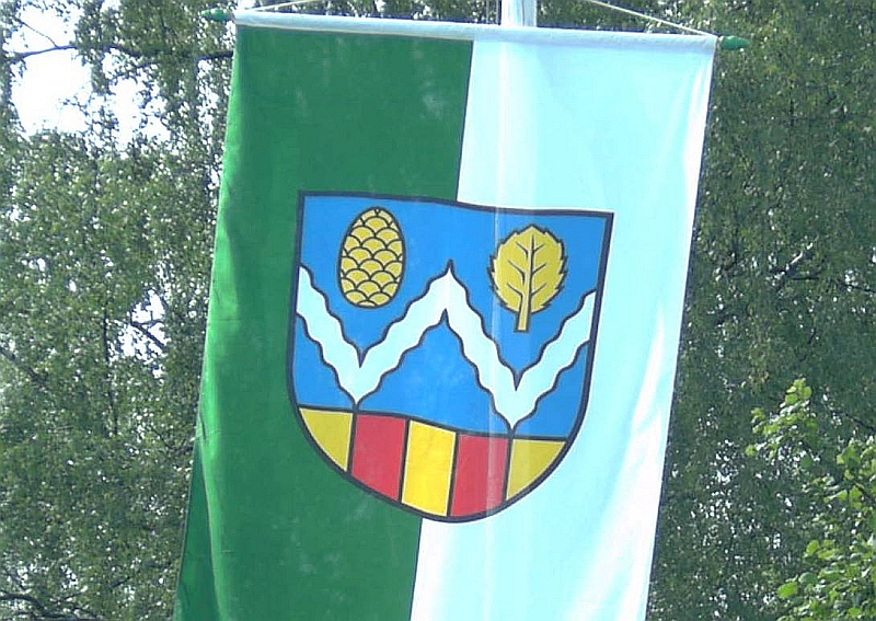 Westfeld (Schmallenberg)_Fahne, Germany.